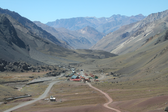 Las Cuevas (aerial view)